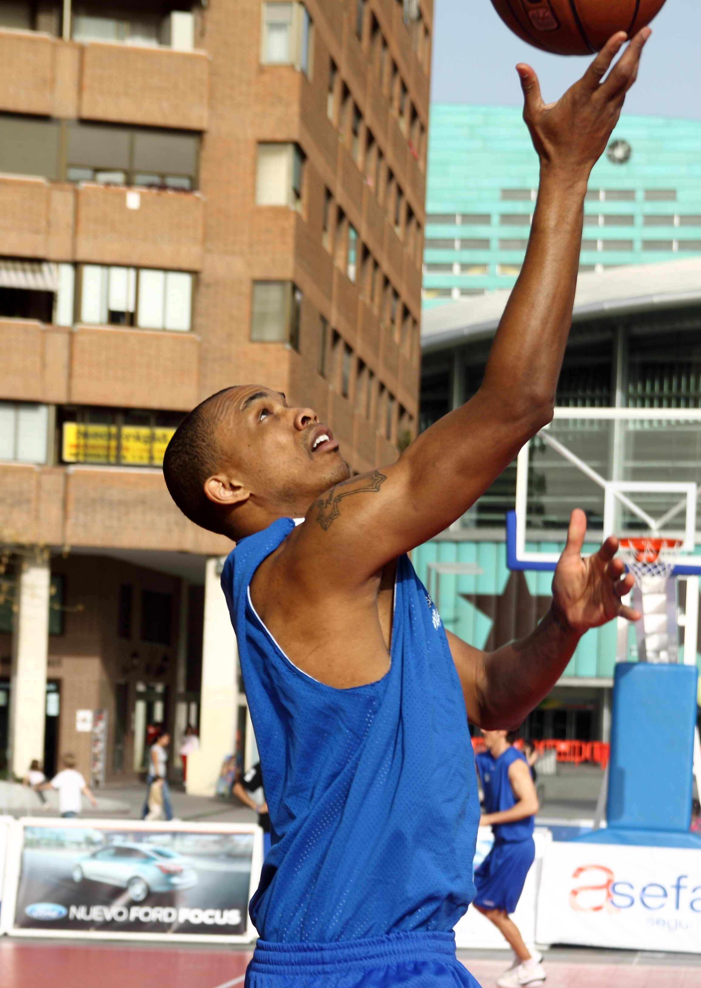 Tyrone Ellis jugando para Estudiantes en una exhibición en la Avenida de Felipe II, Madrid.